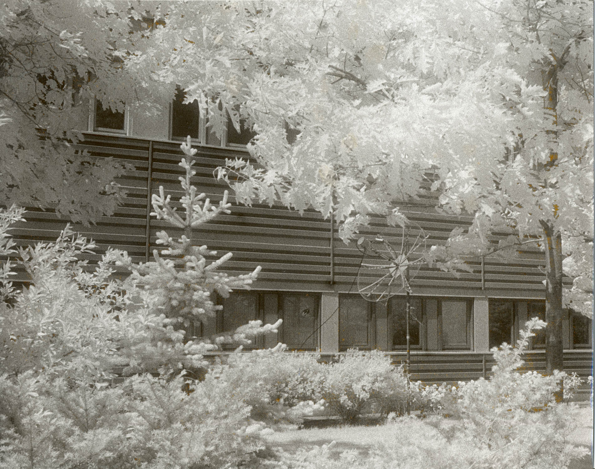 Foto Stefan Linder Foto tagit 1993 våren. Infraröd svartvit film klorofyll effekt.